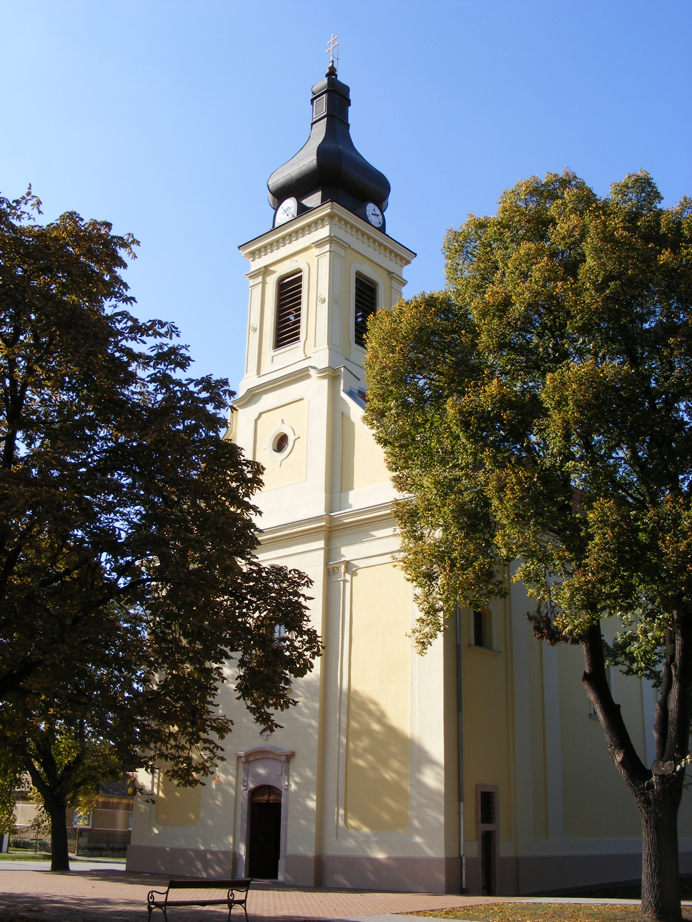 A tarjáni Krisztus Király római katolikus templom